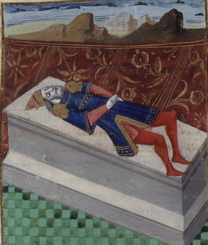 Mort de Frédéric II